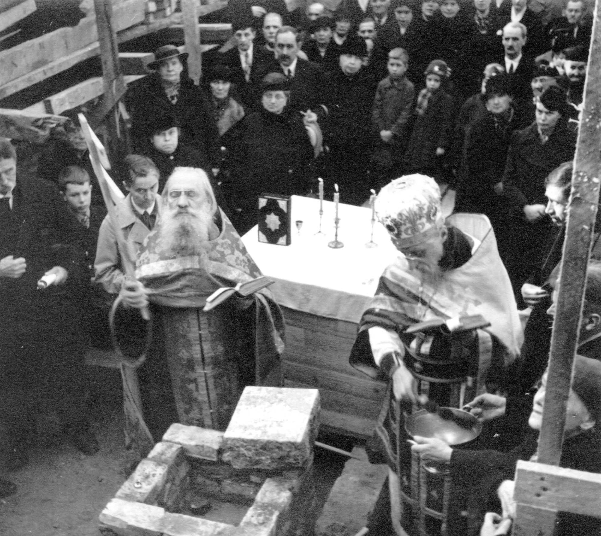 Закладка Никольского храма в Хельсинки